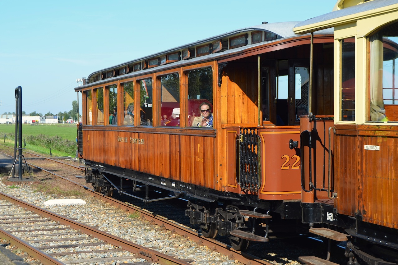 SHM rijtuig AB 22 van de Gooise Stoomtram Maatschappij, te Wognum; 29 september 2013. Foto: Erik Swierstra.